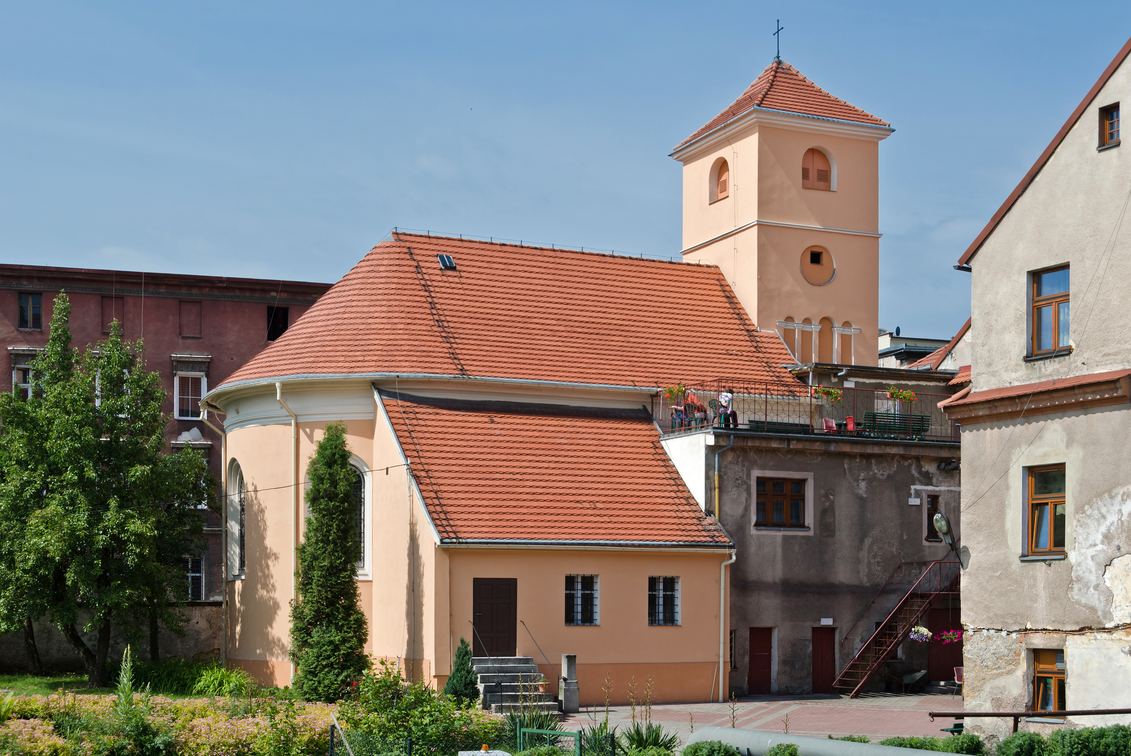 Bystrzyca Kłodzka, kościół szpitalny św. Jana Nepomucena, 1833